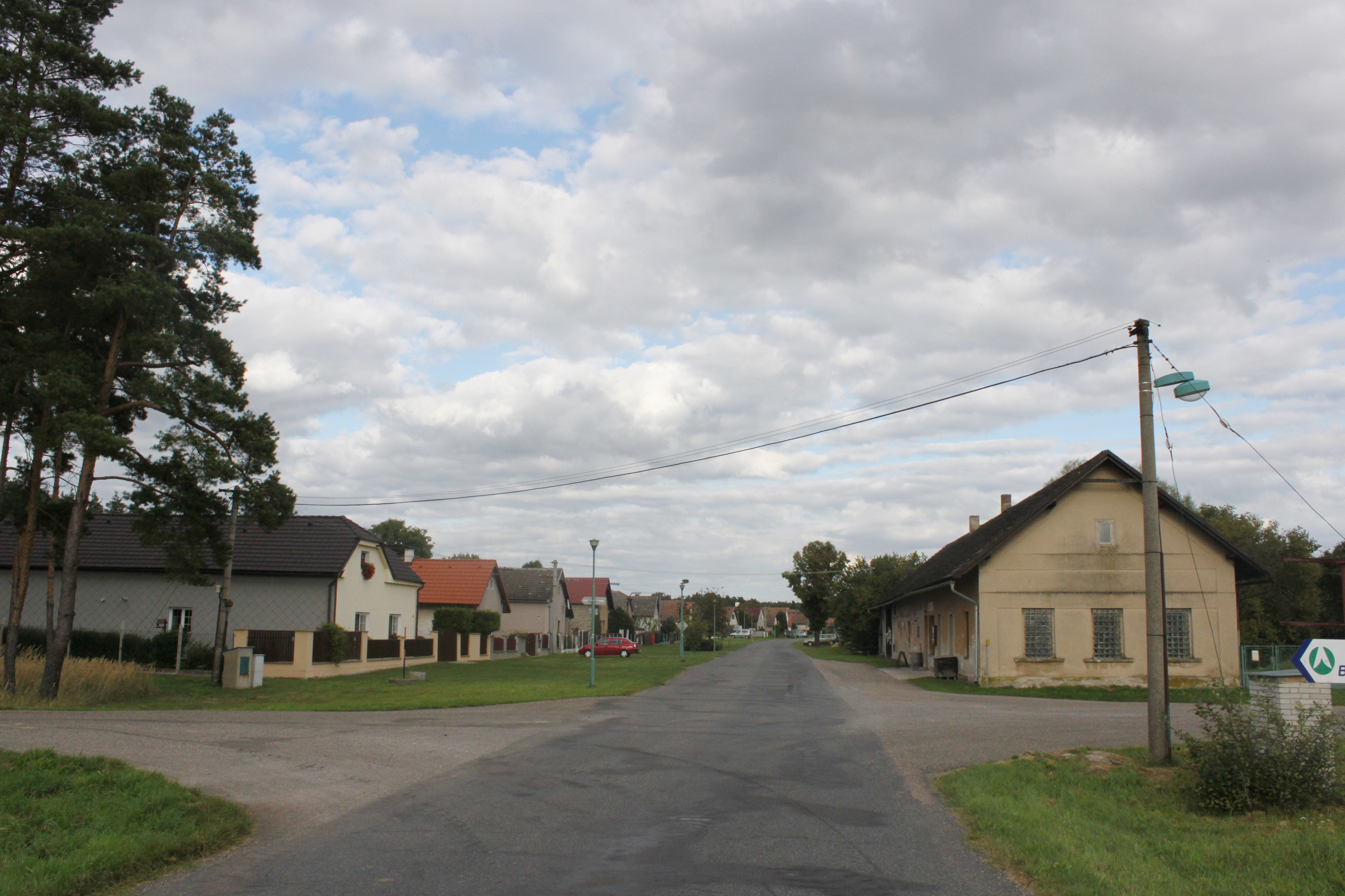 Západní okraj vesnice Labské Chrčice